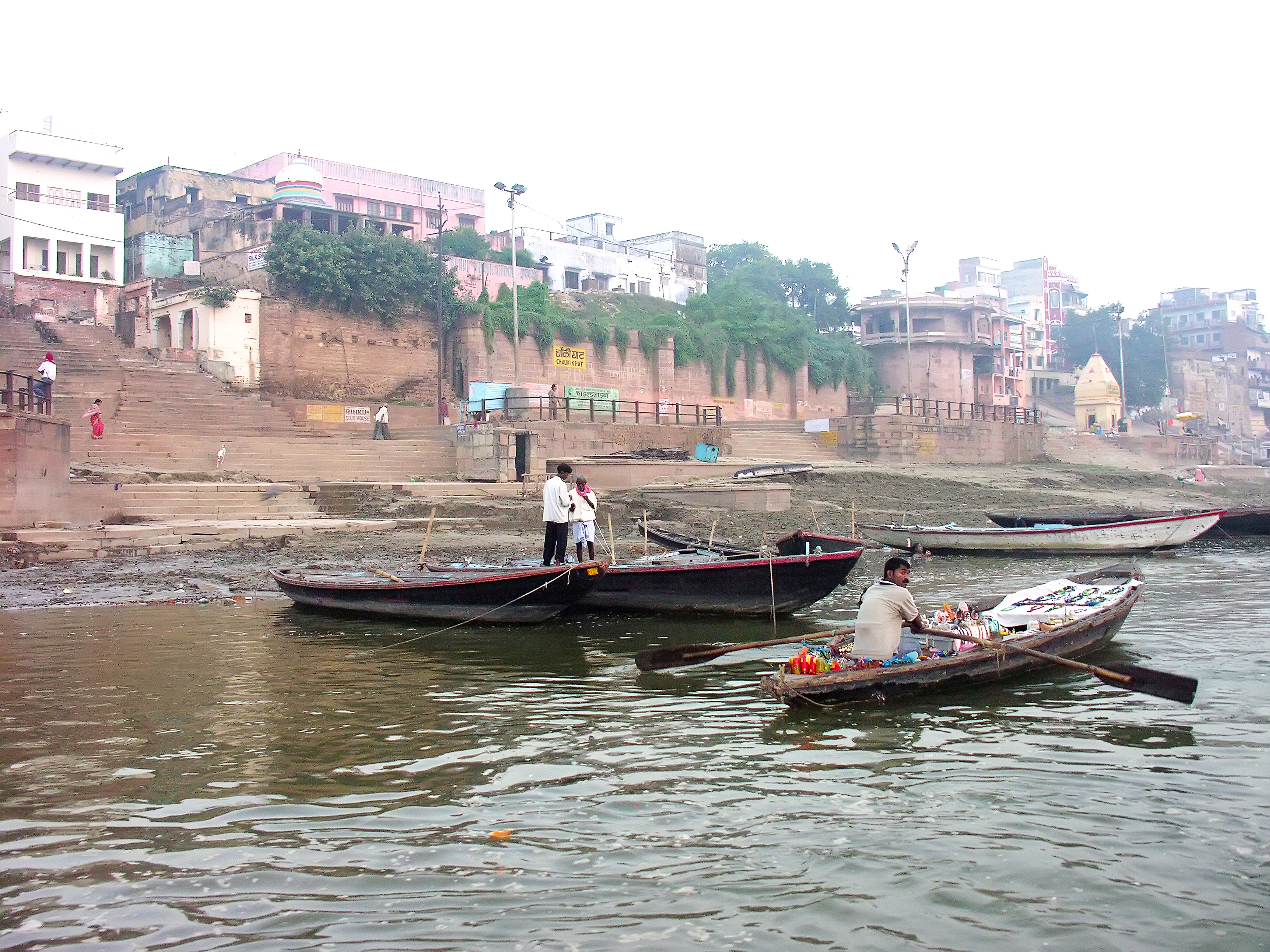 India-5437